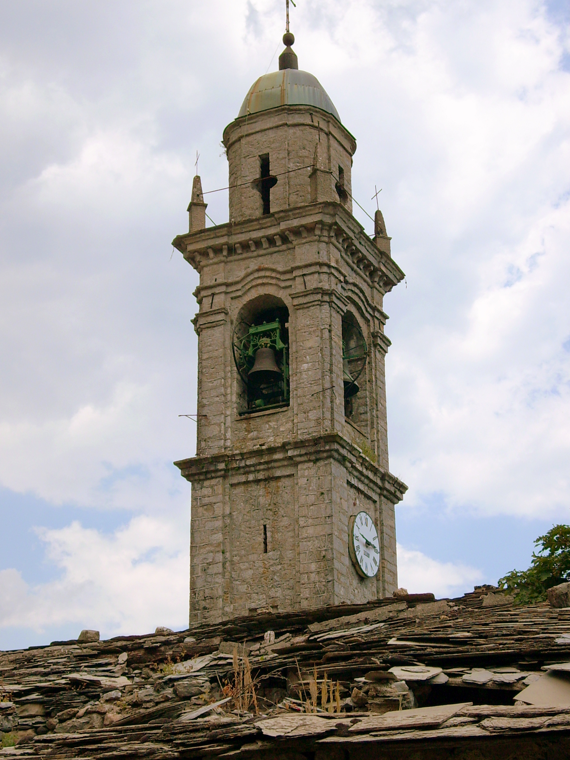 Campanile della chiesa di Cabanne, Rezzoaglio, Liguria, Italia